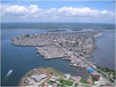 Aerea Tumaco